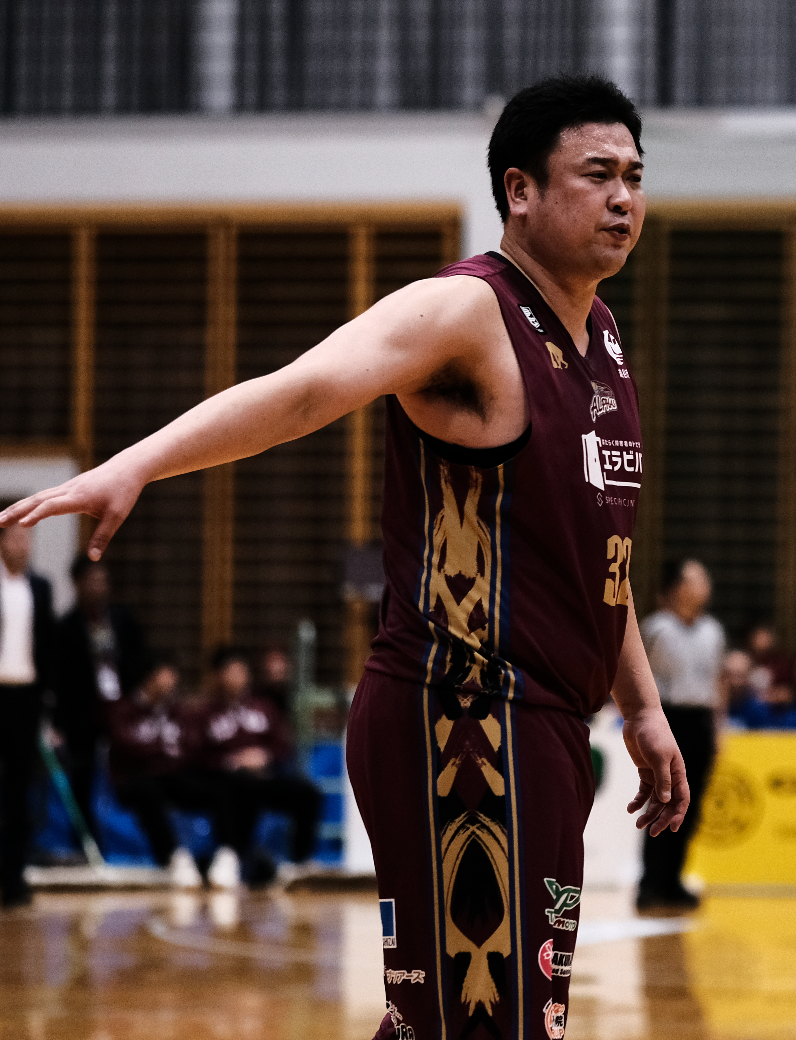 20191123 11月23日 越谷アルファーズ vs ライジングゼファー福岡